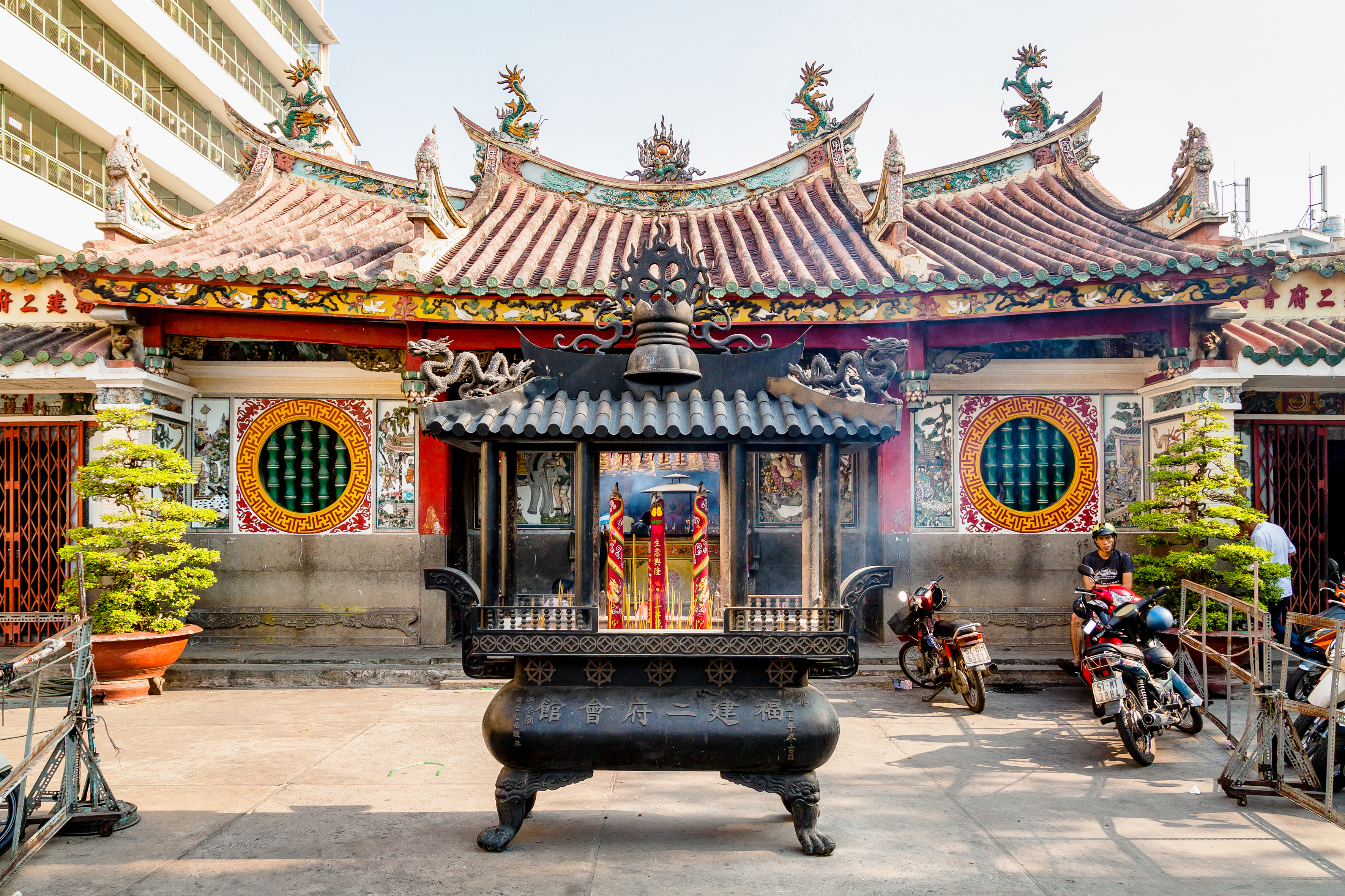 Miếu Nhị Phủ là một ngôi miếu cổ do người Hoa xây dựng vào khoảng đầu thế kỷ 18. Hiện ngôi miếu tọa lạc tại số 264 đường Hải Thượng Lãn Ông, phường 14, quận 5, Thành phố Hồ Chí Minh, Việt Nam.